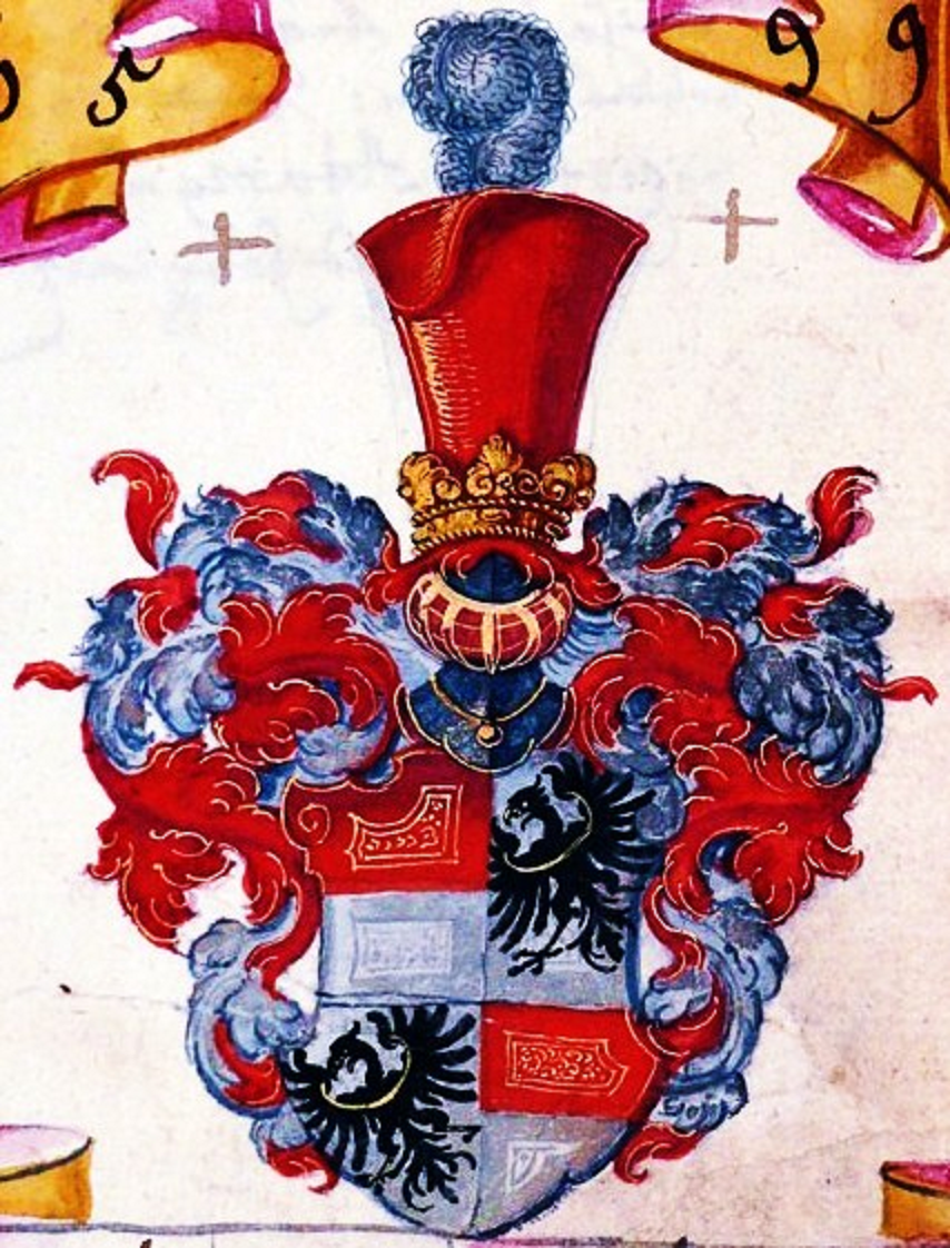 Wappen des Johannes Nicolaus Popel Freiherr von Lobkowitz („Liber Baro á Lobkowitz“); Wahlspruch „Spes mea est christus“)